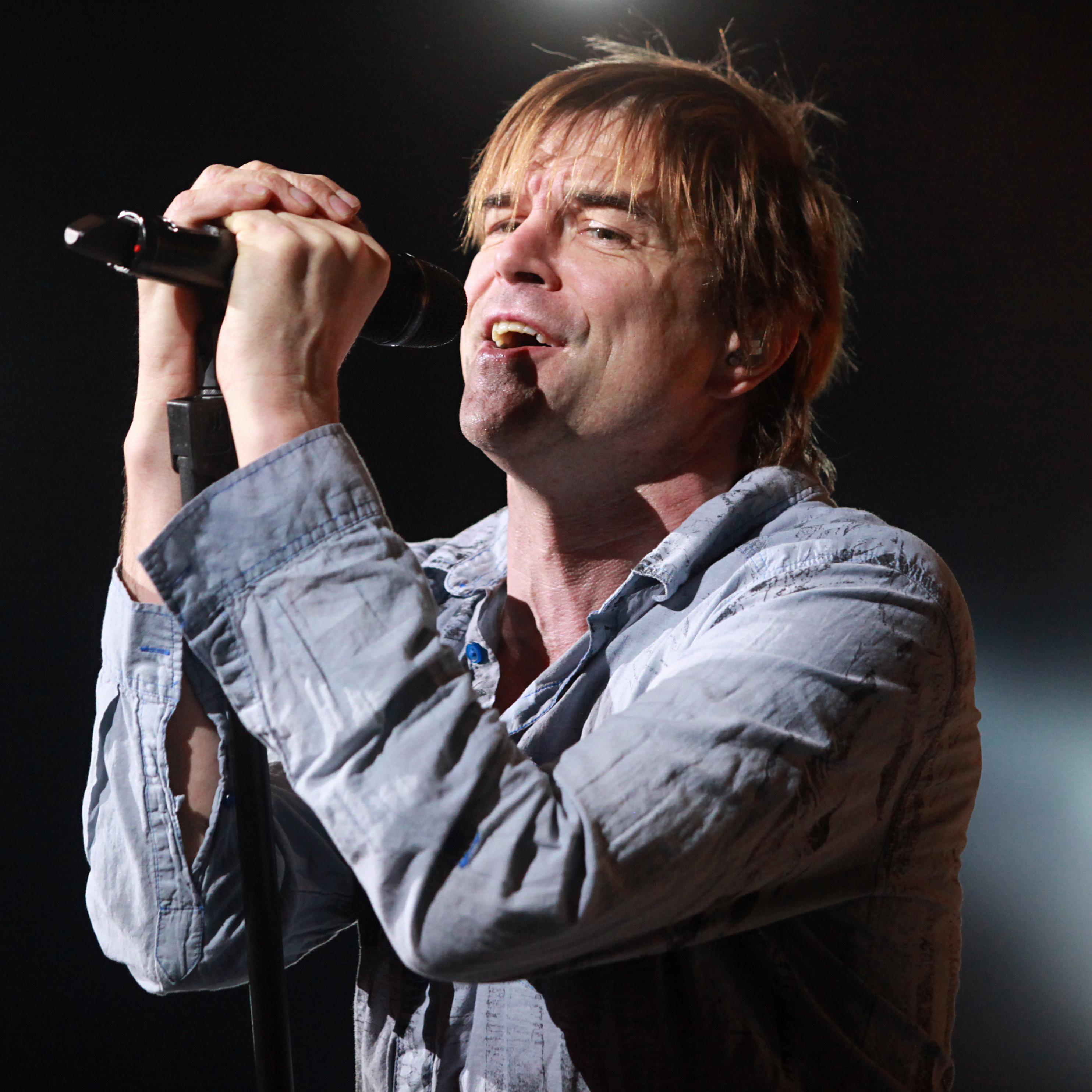 Campino, bürgerlich Andreas Frege, von den Toten Hosen am 15. Dezember 2012 in der SAP Arena in Mannheim.